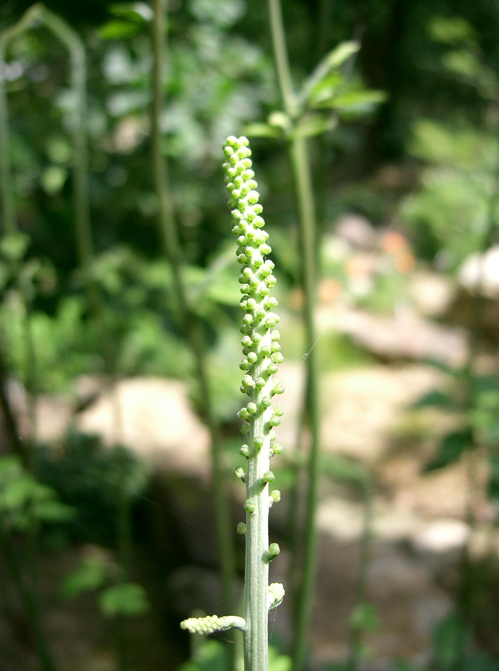 Cimicifuga simplex